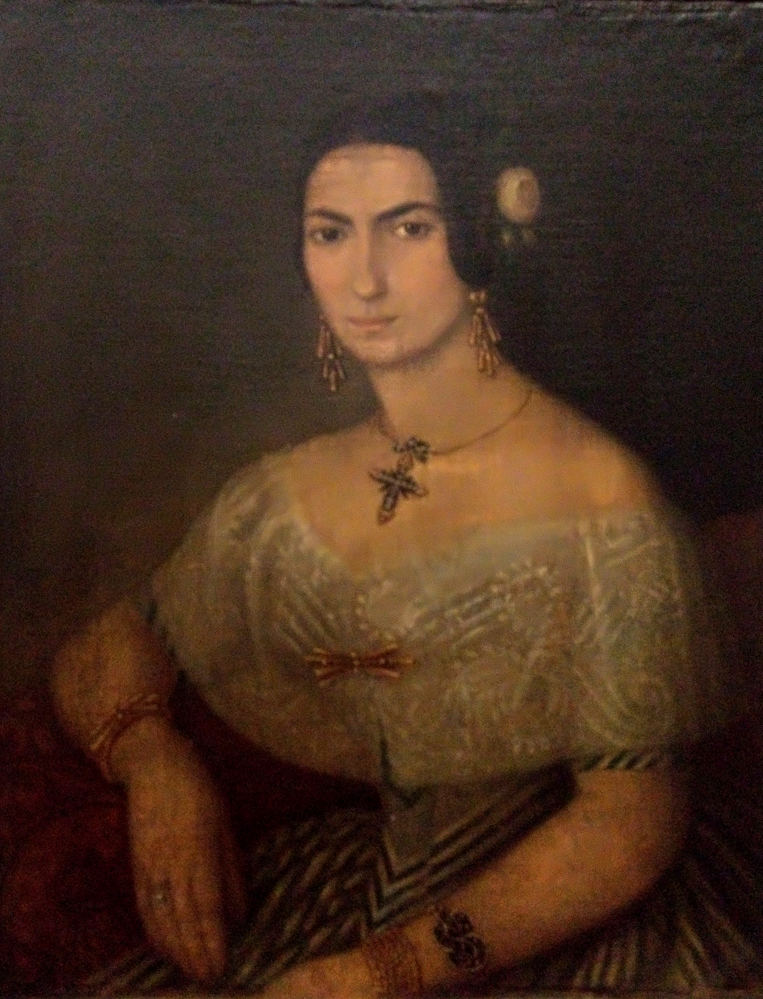 Portret de femeie, Muzeul Municipiului Bucureşti, 5 cm